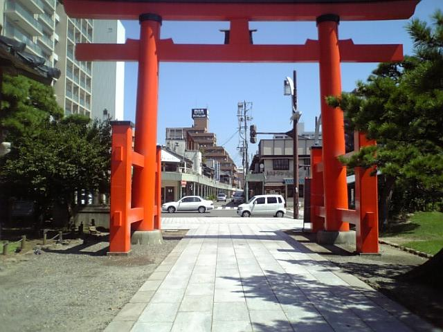 古町通り起点（中央区古町通１番町）。白山公園入口より望む。